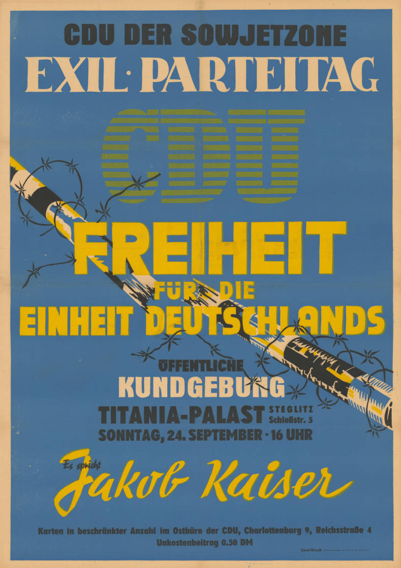 CDU der Sowjetzone Exil - Parteitag CDU Freiheit für die Einheit Deutschlands Öffentliche Kundgebung ... Es spricht: Jakob Kaiser Karten in beschränkter Anzahl im Ost-Büro der CDU ... Abbildung: Durchbrochener mit Stacheldraht umwickelter Schlagbaum (Grafik) Plakatart: Ankündigungsplakat Auftraggeber: Ost-Büro der CDU Drucker_Druckart_Druckort: Linol-Druck Berliner Ausstellungen, Abt. Berek, Charlottenburg Objekt-Signatur: 10-024 : 189 Bestand: Plakate aus der SBZ/DDR (10-024) GliederungBestand10-18: Ost-CDU / CDUD / Exil-CDU Lizenz: KAS/ACDP 10-024 : 189 CC-BY-SA 3.0 DE